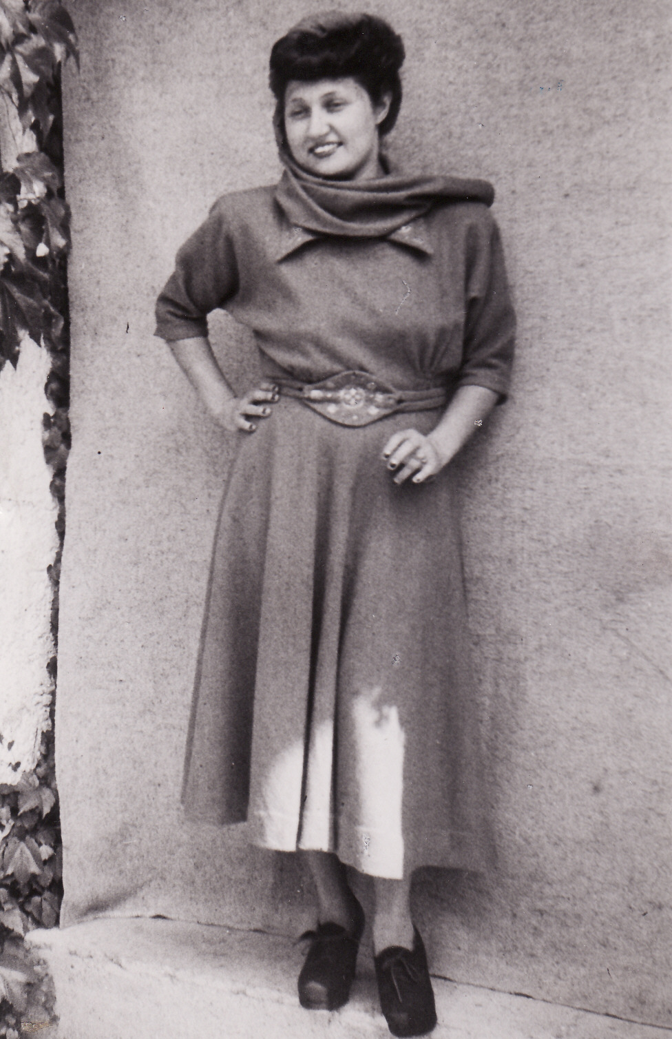 Sonja De Lennart modelt ihren ersten Caprirock und Caprigürtel